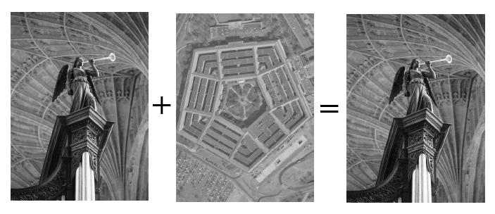 Ejemplo de la tecnica de Esteganografía LSB